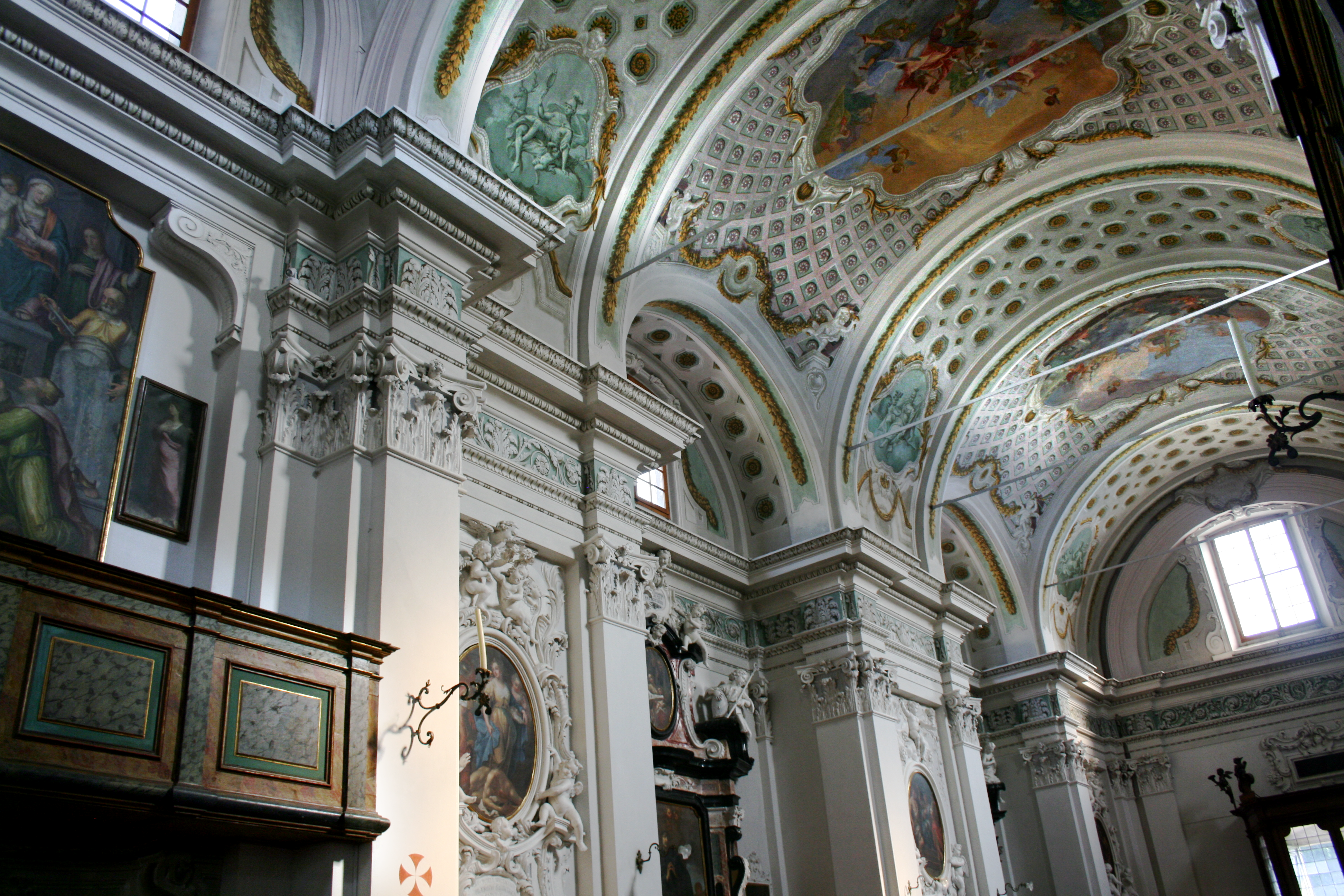 Chiesa di san Giovanni: volta della navata, in direzione dell'ingresso.